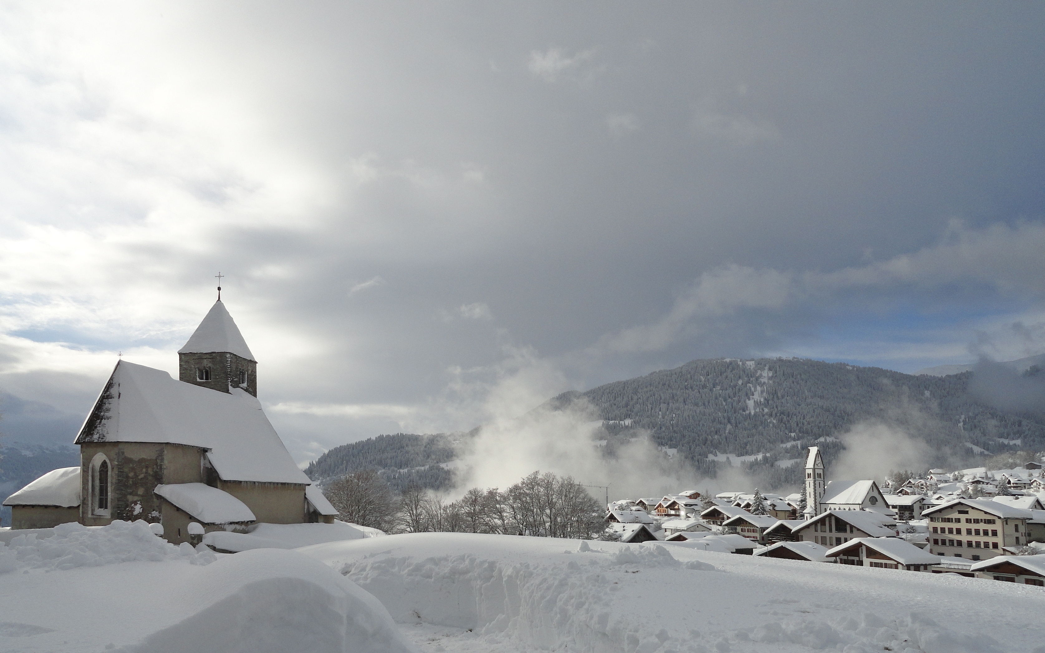 Remigiuskirche (Falera)